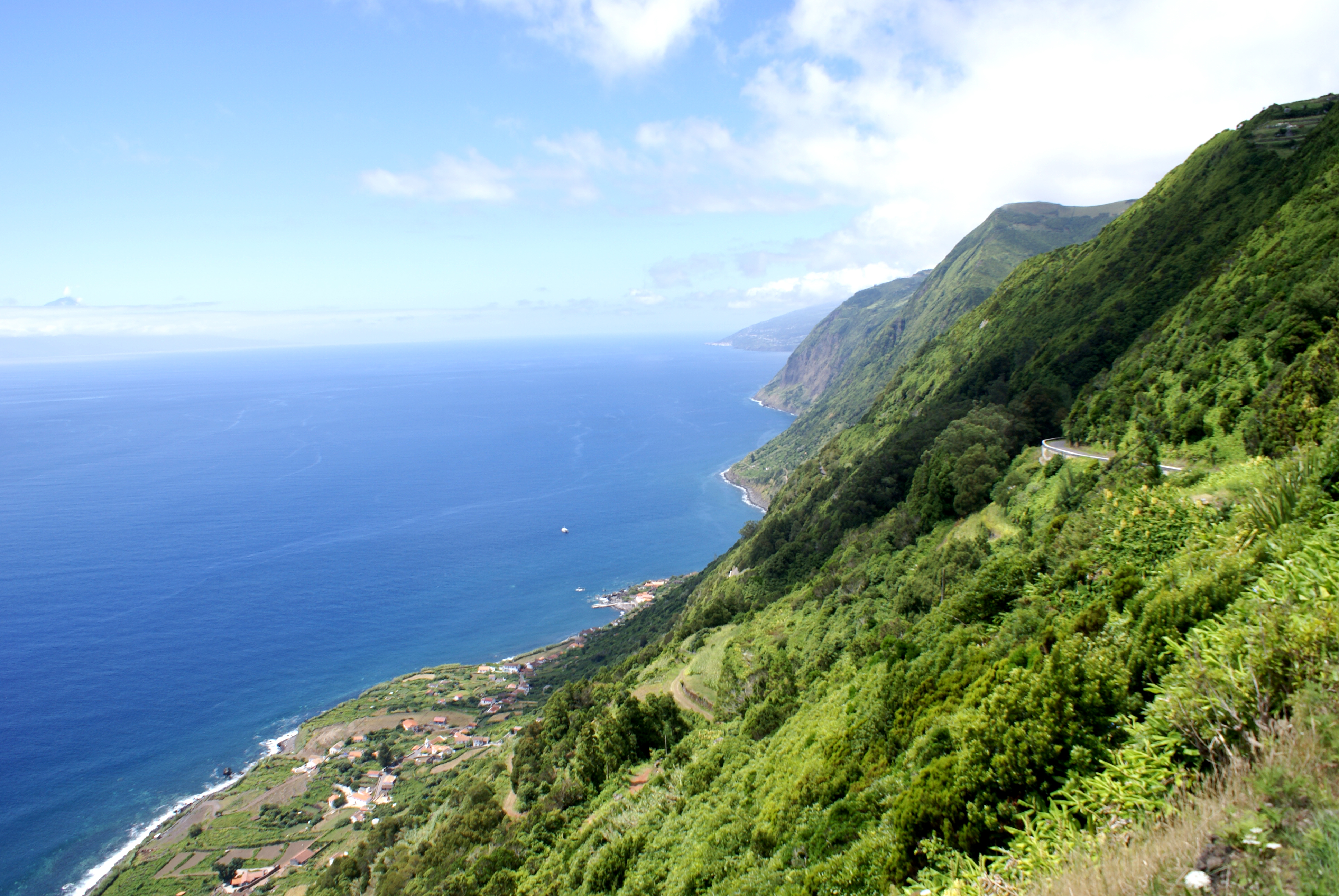 Fajã de São João, inico da descida à fajã, Calheta, ilha de São Jorge, Açores